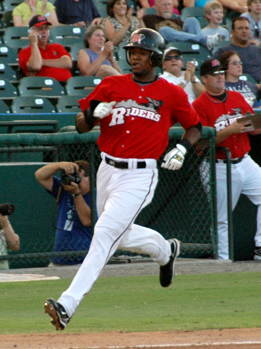 Julio Borbon